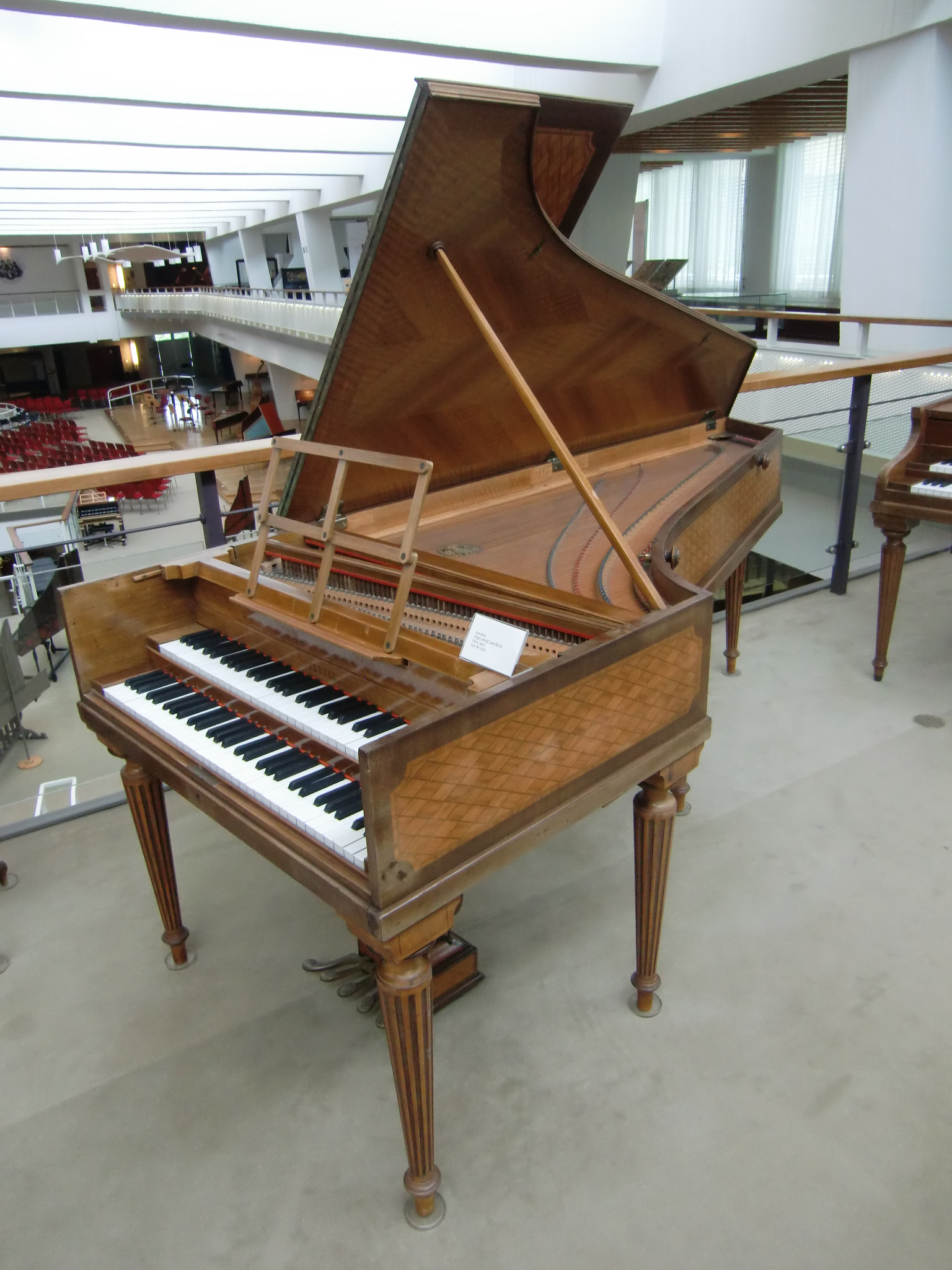 Clavecin Pleyel-Wolff-Lyon (Paris 1905) - Berlin, Musikinstrumentenmuseum